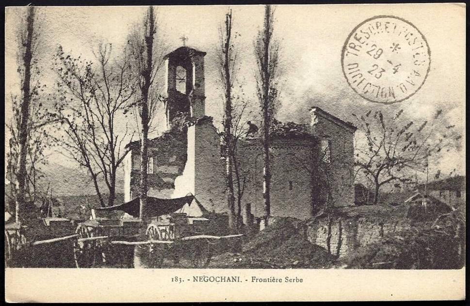 Разрушената църква в Негочани през Първата световна война